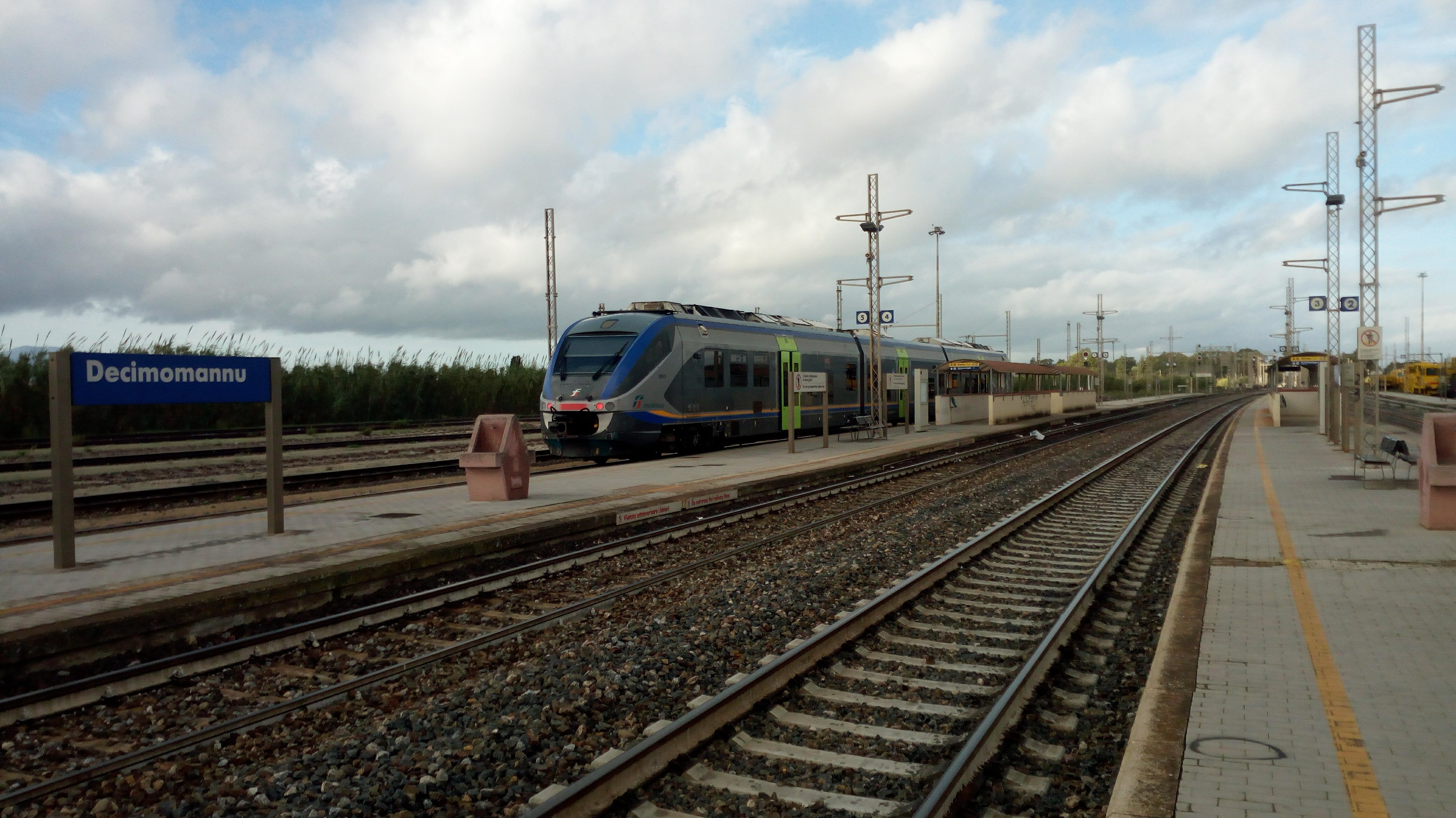 I binari 3 e 4 della Stazione di Decimomannu. Nel binario 5 è presente un Minuetto in partenza in direzione Villaspeciosa-Uta.